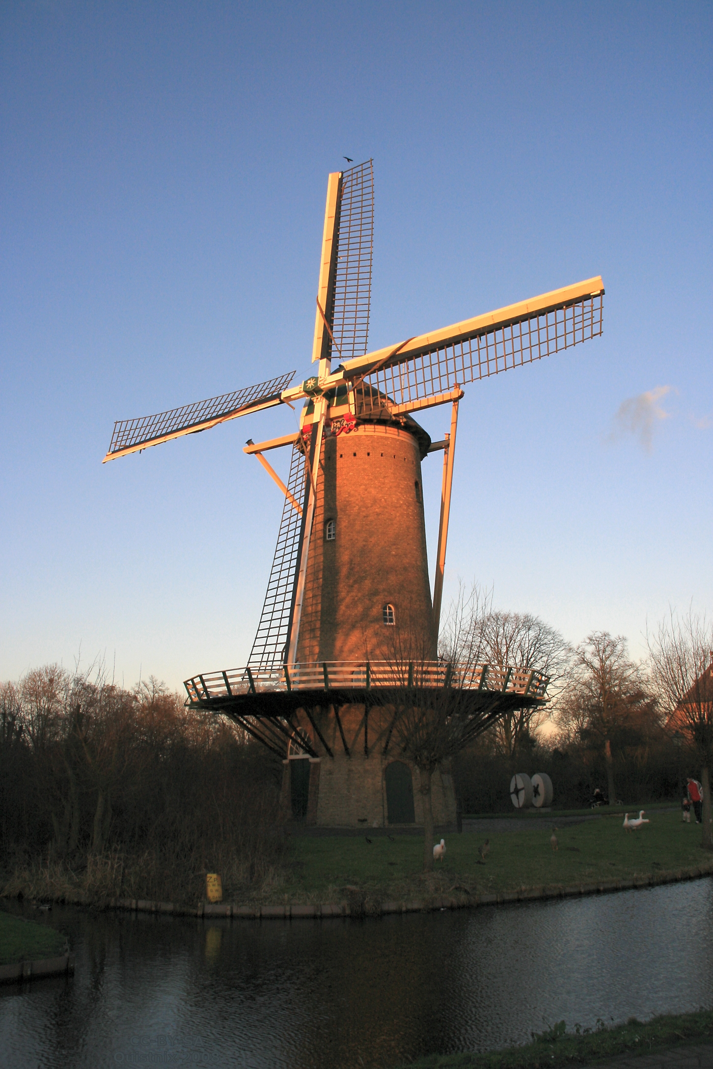 Rotterdam-Overschie, windmolen De Speelman in het avondlicht